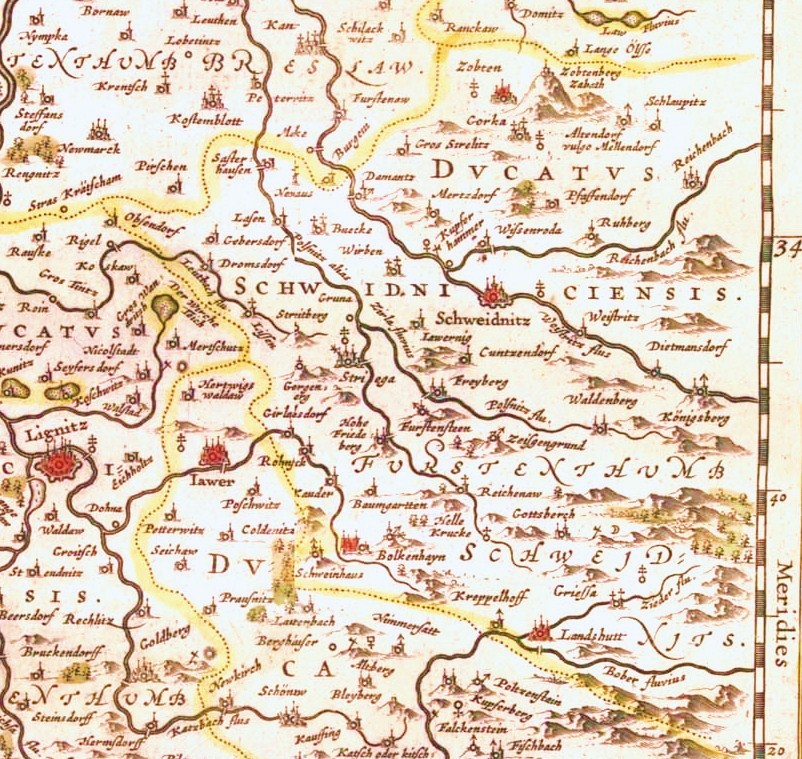 Księstwo świdnickie z fragmentem jaworskiego w 1645 roku.